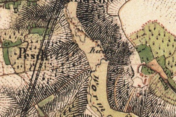 Preußische Uraufnahme 1836-1850